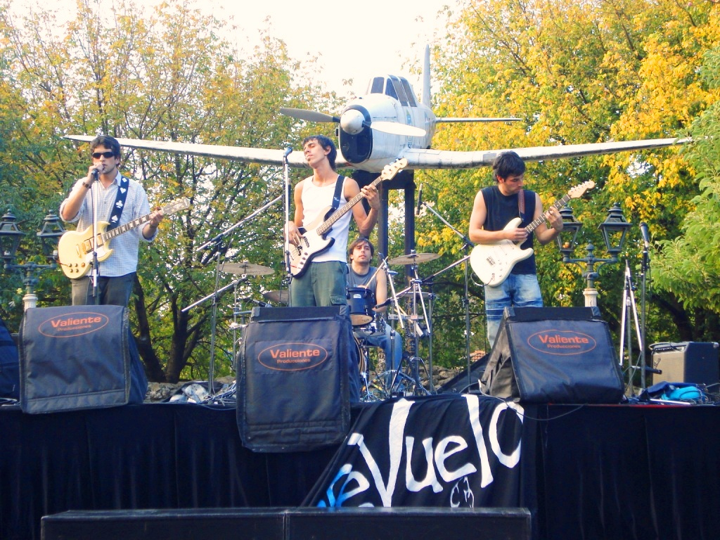 Sobrevuelo en la Plaza del Avión, Ciudad Jardín, Palomar. Abril 2008.